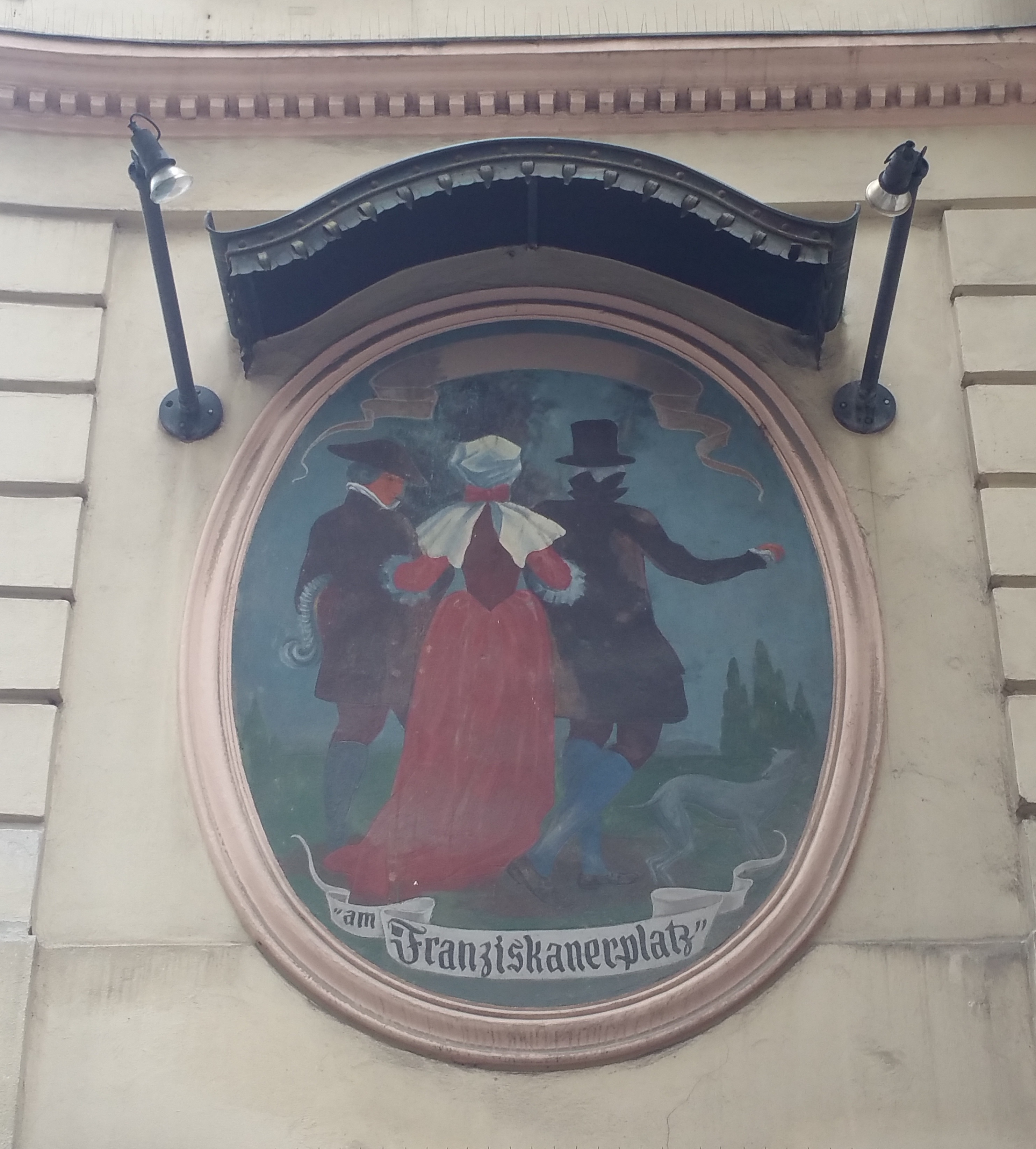 Wandbild am Franziskanerplatz Nr. 6, Wien-Innere Stadt